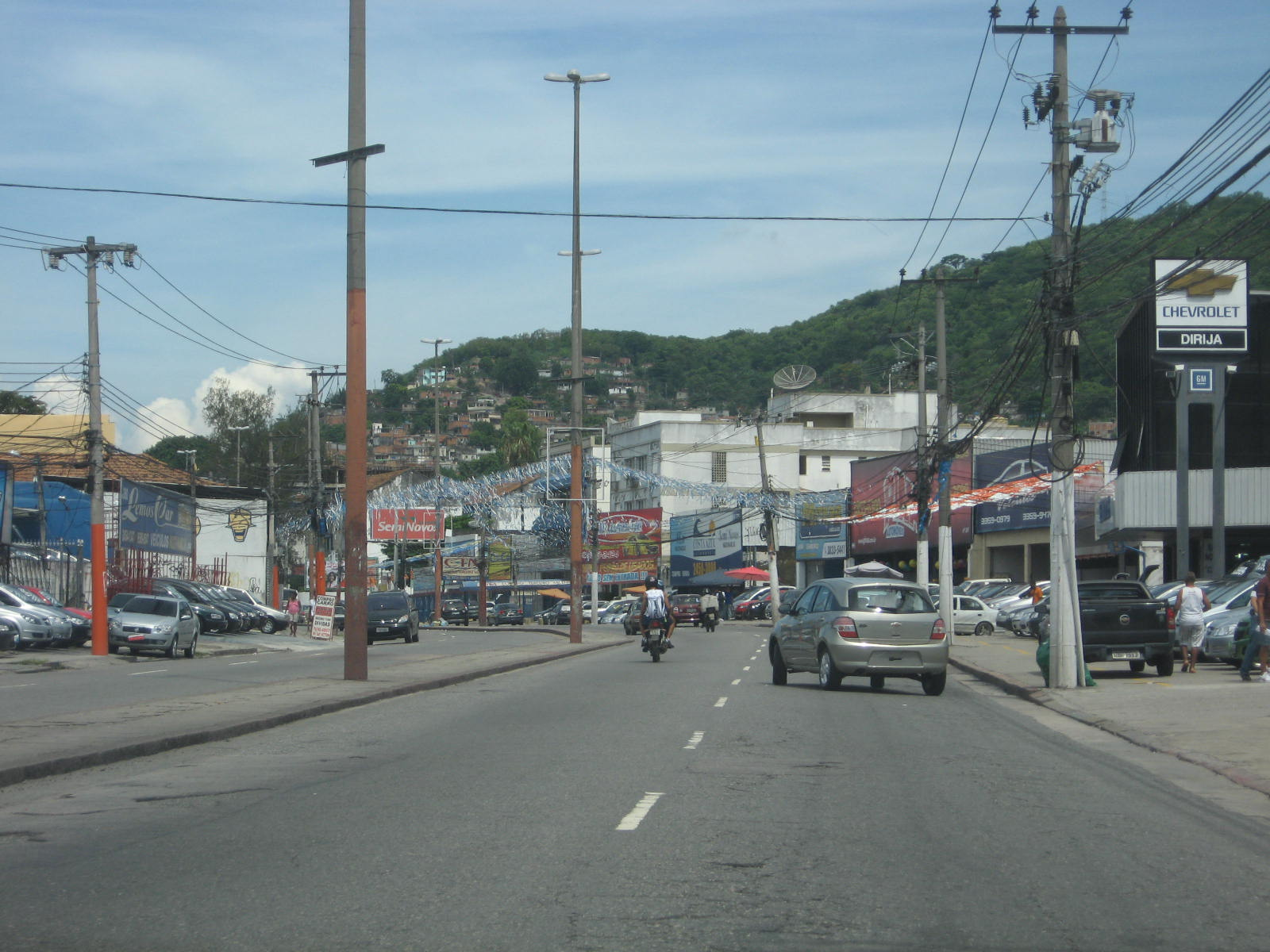 Vista do bairro Jacarepaguá, no Rio de Janeiro